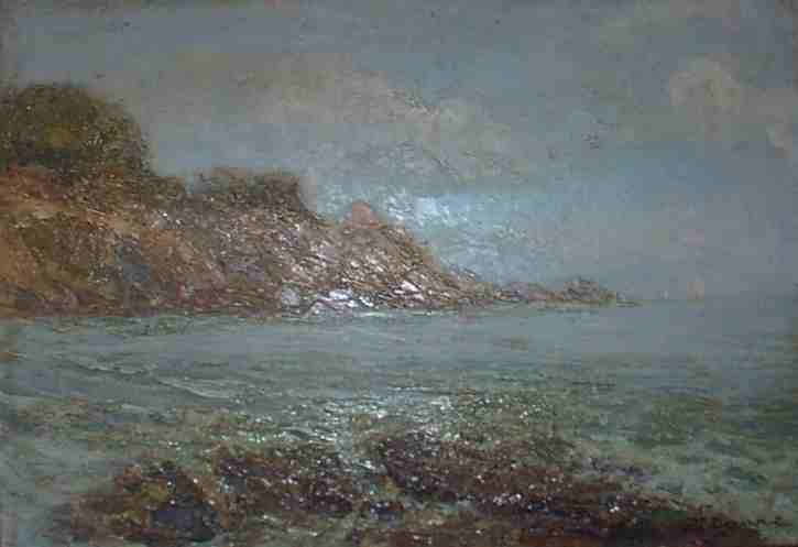 Andrea Figari "marina", olio su tela